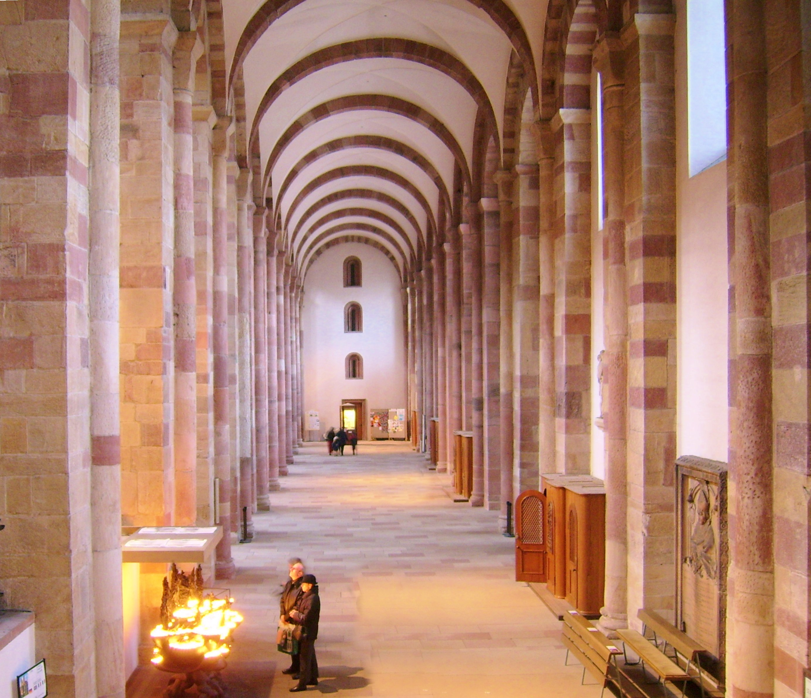 Dom zu Speyer Seitenschiff